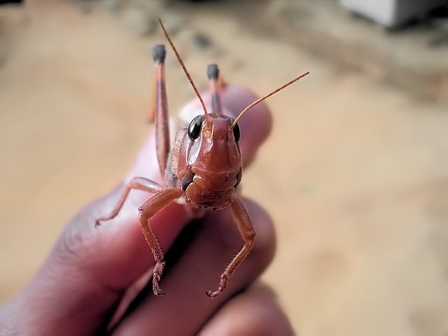 Echantillon de criquet de Madagascar durant une invasion